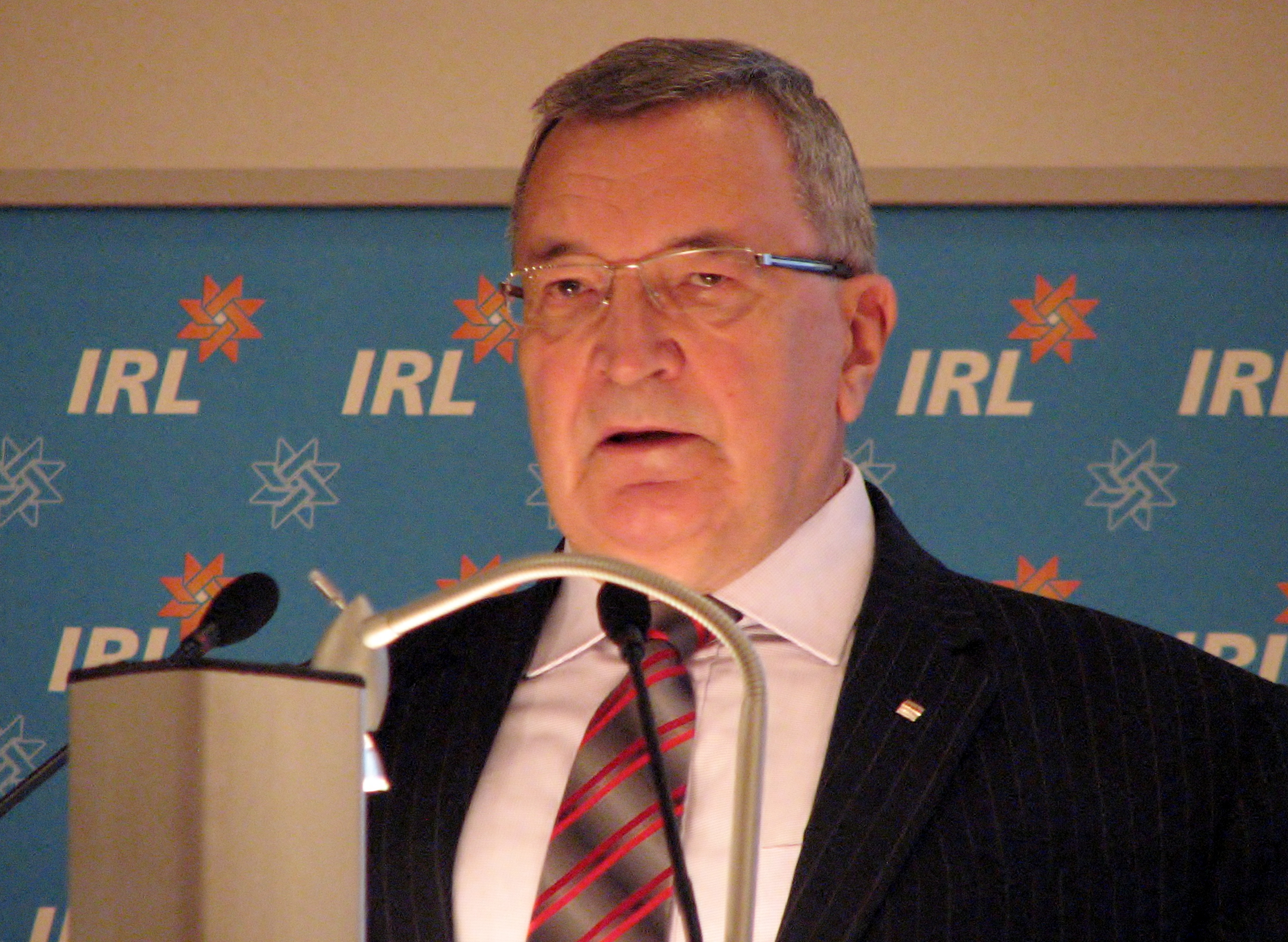 TTÜ rektor professor Andres Keevallik esinemas IRL-i hariduskonverentsil